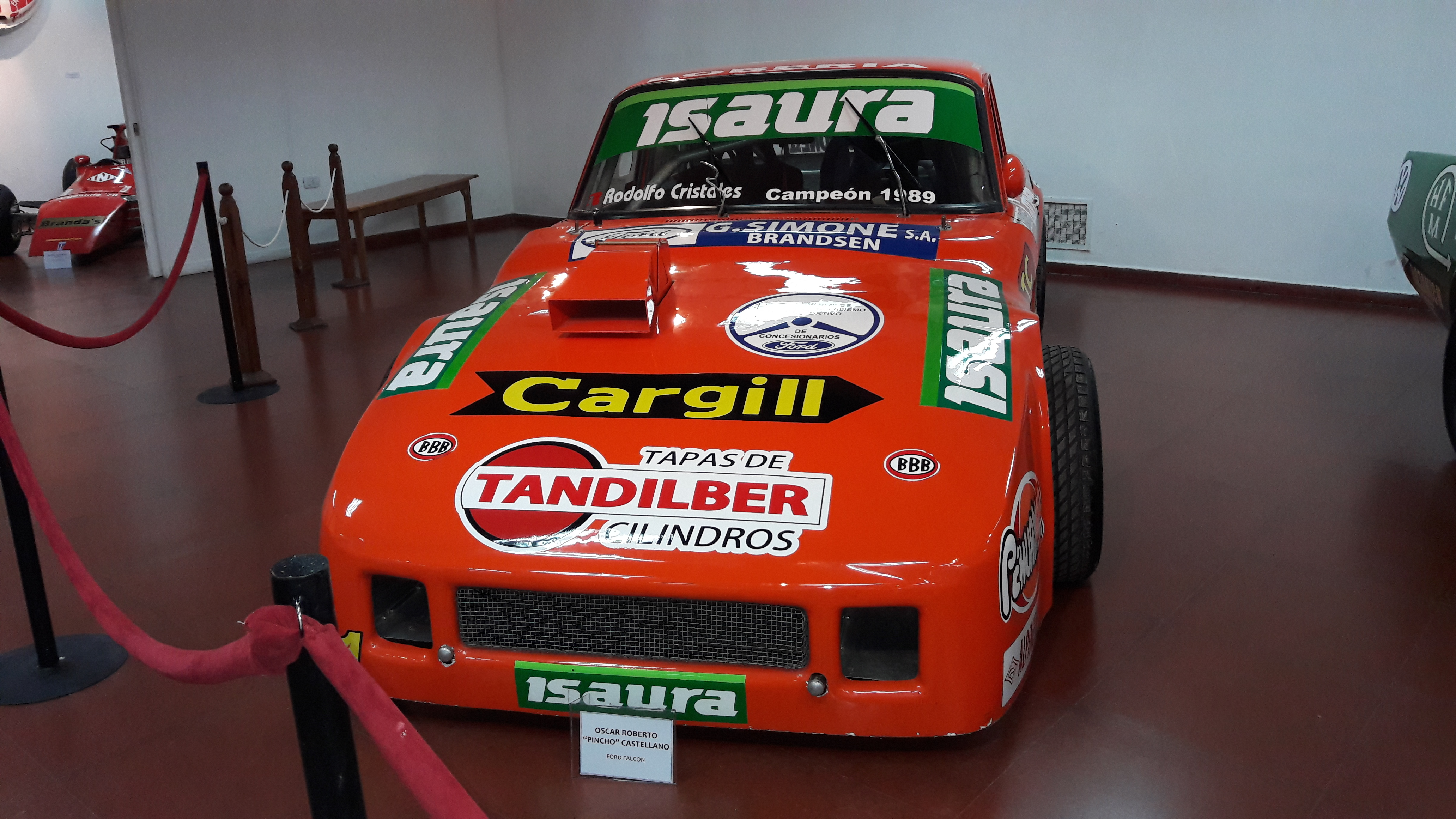 Ford Falcon - Oscar Castellano. Expo Autos, Museo de Bellas Artes de Luján.